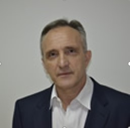 Fotografija prof.dr Željka Nikača